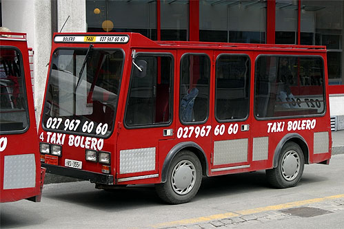 Elektro-Taxi beim Bahnhof Zermatt